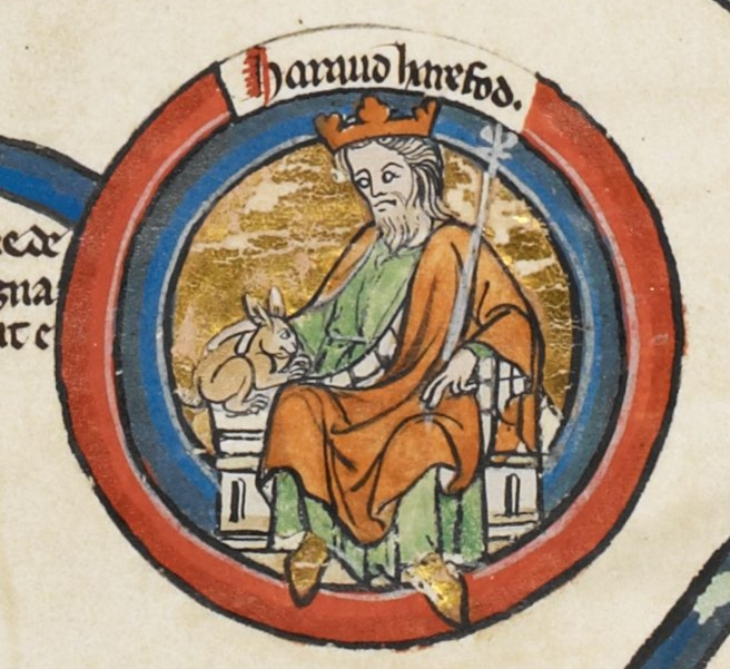 Miniature de Harold Pied-de-Lièvre dans une généalogie royale du XIVe siècle.